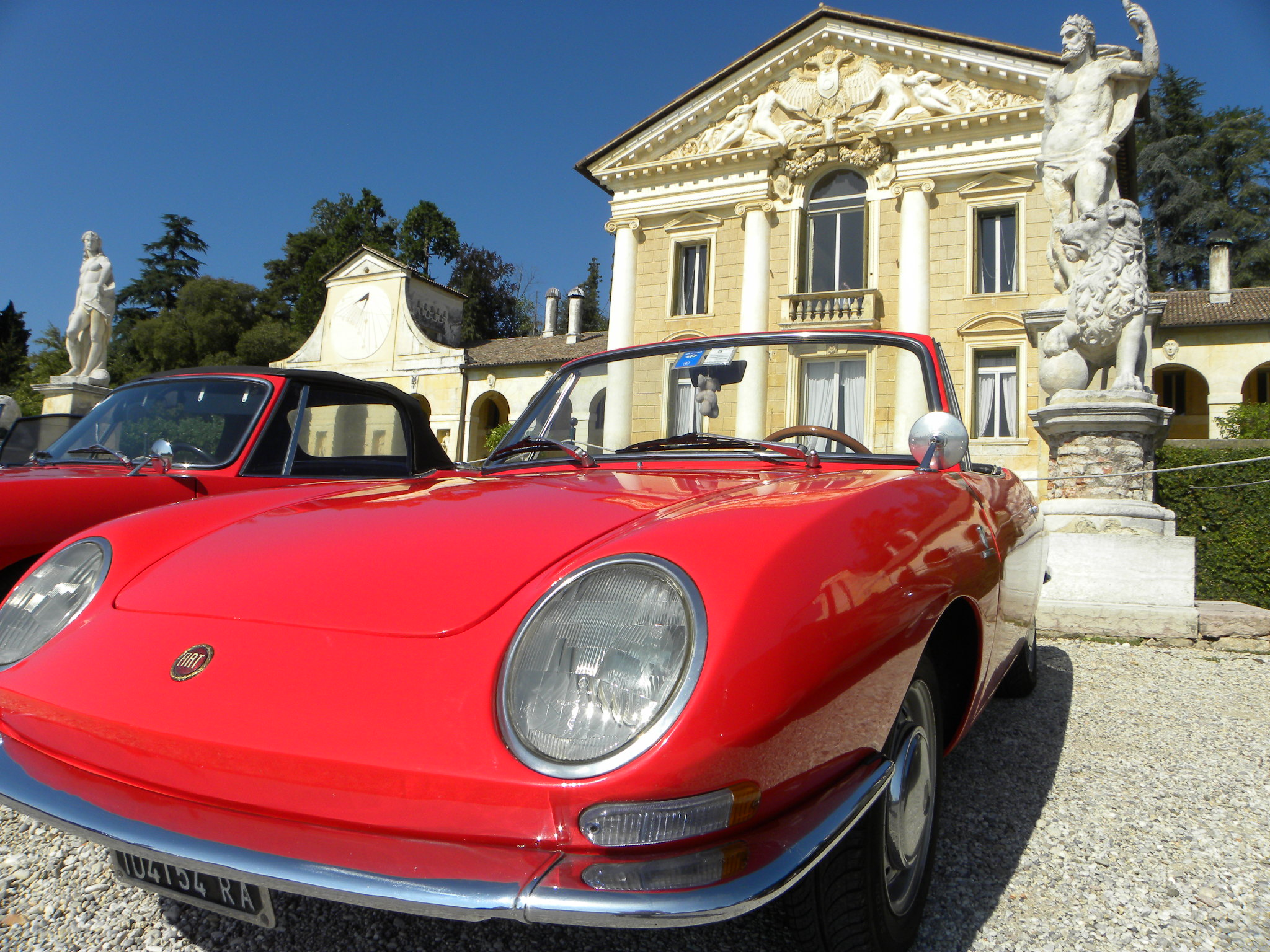 vista di fronte con particolare dei gruppi ottici anteriori e paraurti a baffo su fiat 850 spider prima serie del 1965